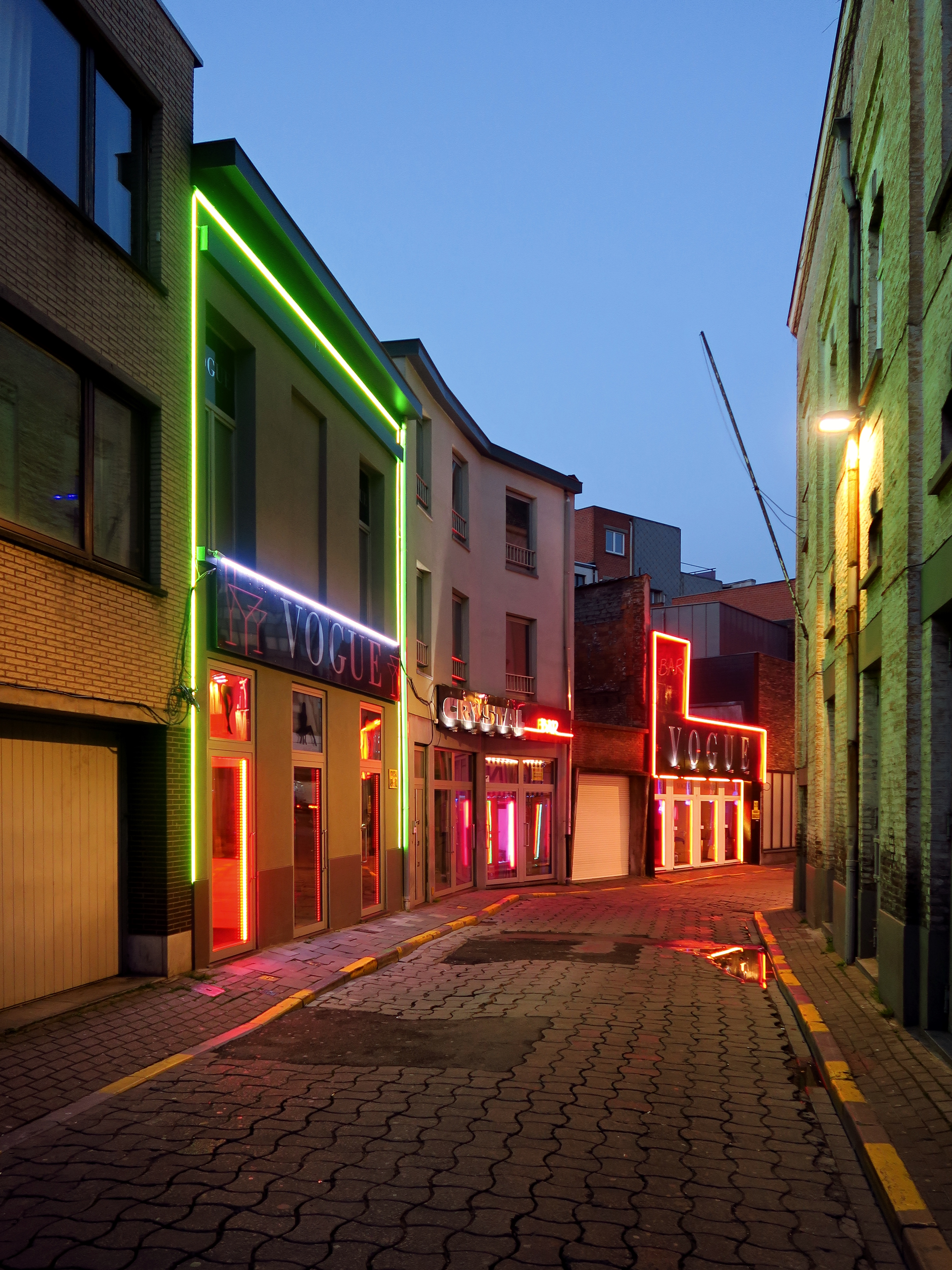 Gent (Oost-Vlaanderen, België) - Schepenenvijverstraat.